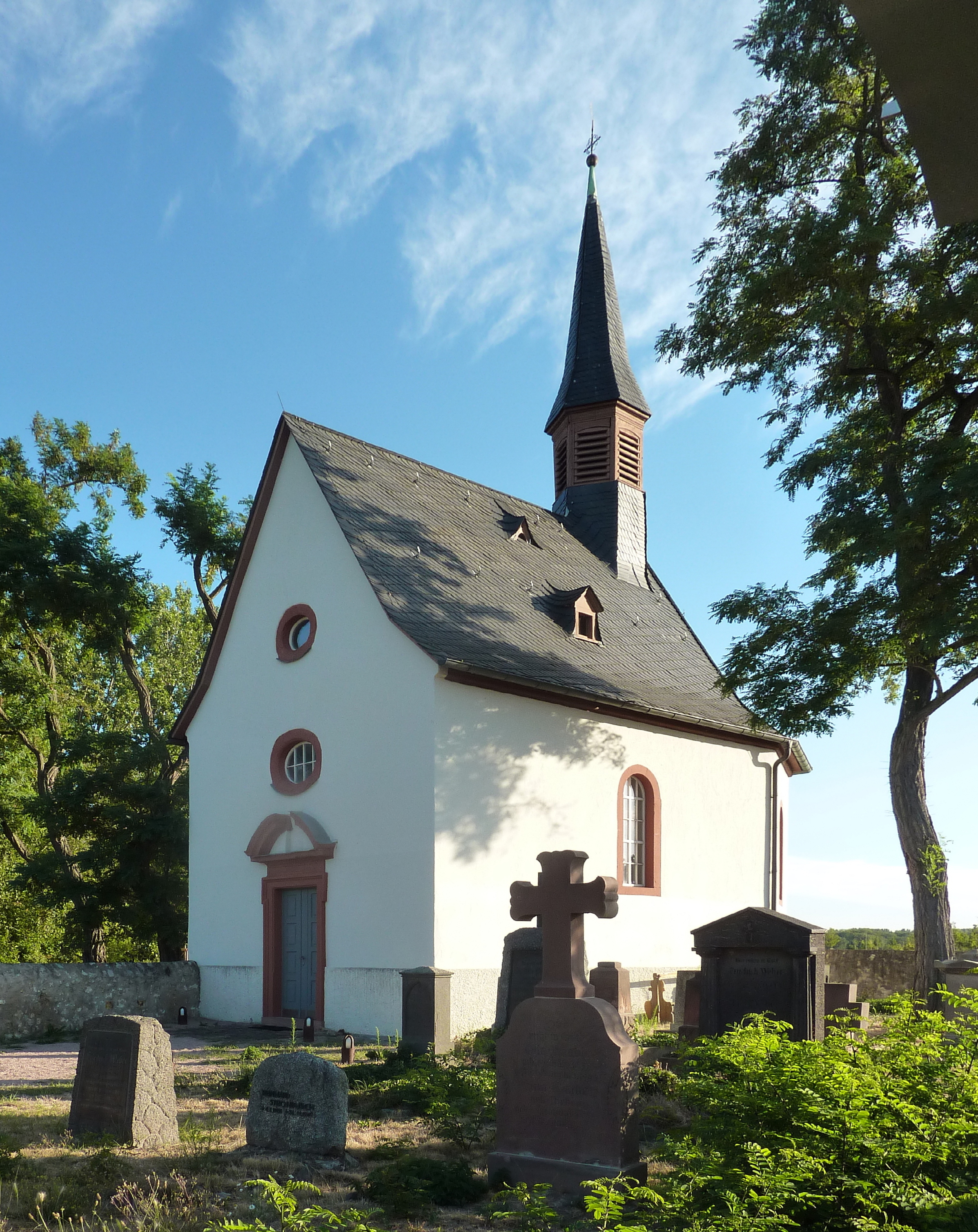 Die Mönchhofkapelle ist ein barocker Kirchenbau auf der Gemarkung der hessischen Gemeinde Raunheim im Kreis Groß-Gerau. Das auf das 17. Jahrhundert zurückgehende Gebäude mit Kirchhof steht am orographisch linken, dort südlichen Mainufer. Ansicht der Kapelle von Südwesten